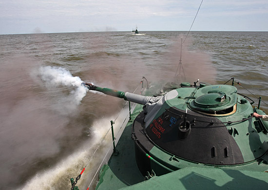 Проекта 1204 "Шмель" - Дивизионом артиллерийских катеров охраны водного района Каспийской флотилии